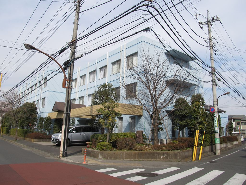 富山県学生寮。東京都府中市若松町四